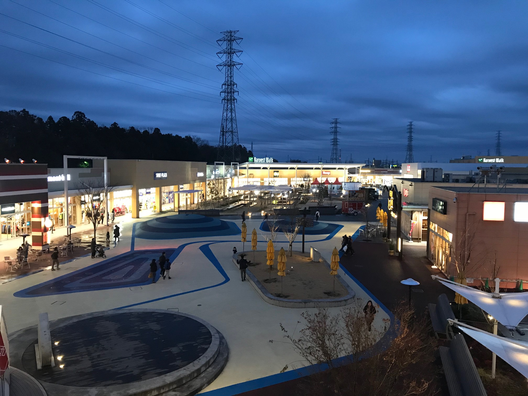 おやまゆうえんハーヴェストウォーク